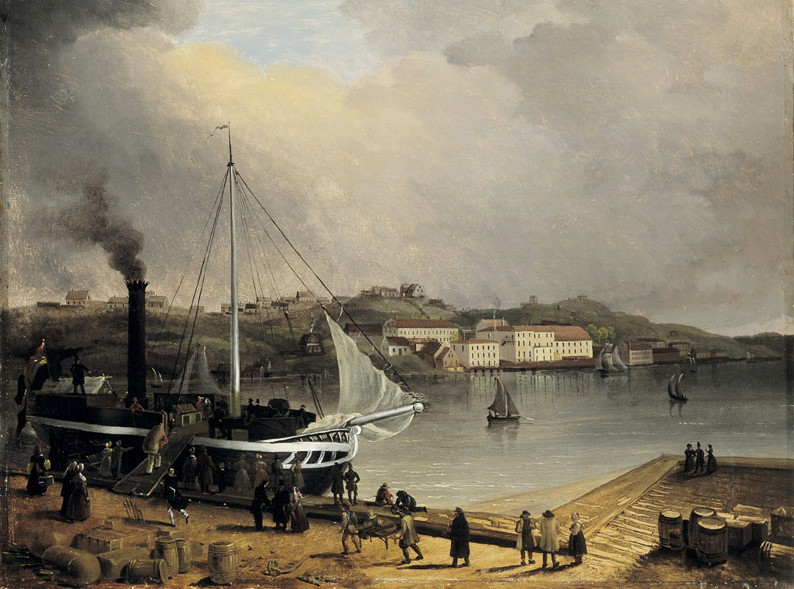 Riddarfjärden från Riddarholmen med Öbergska klädesfariken i bakgrunden